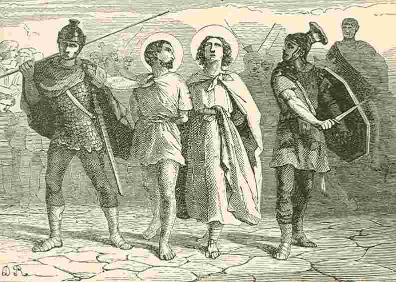 Nazariusz i Celsus